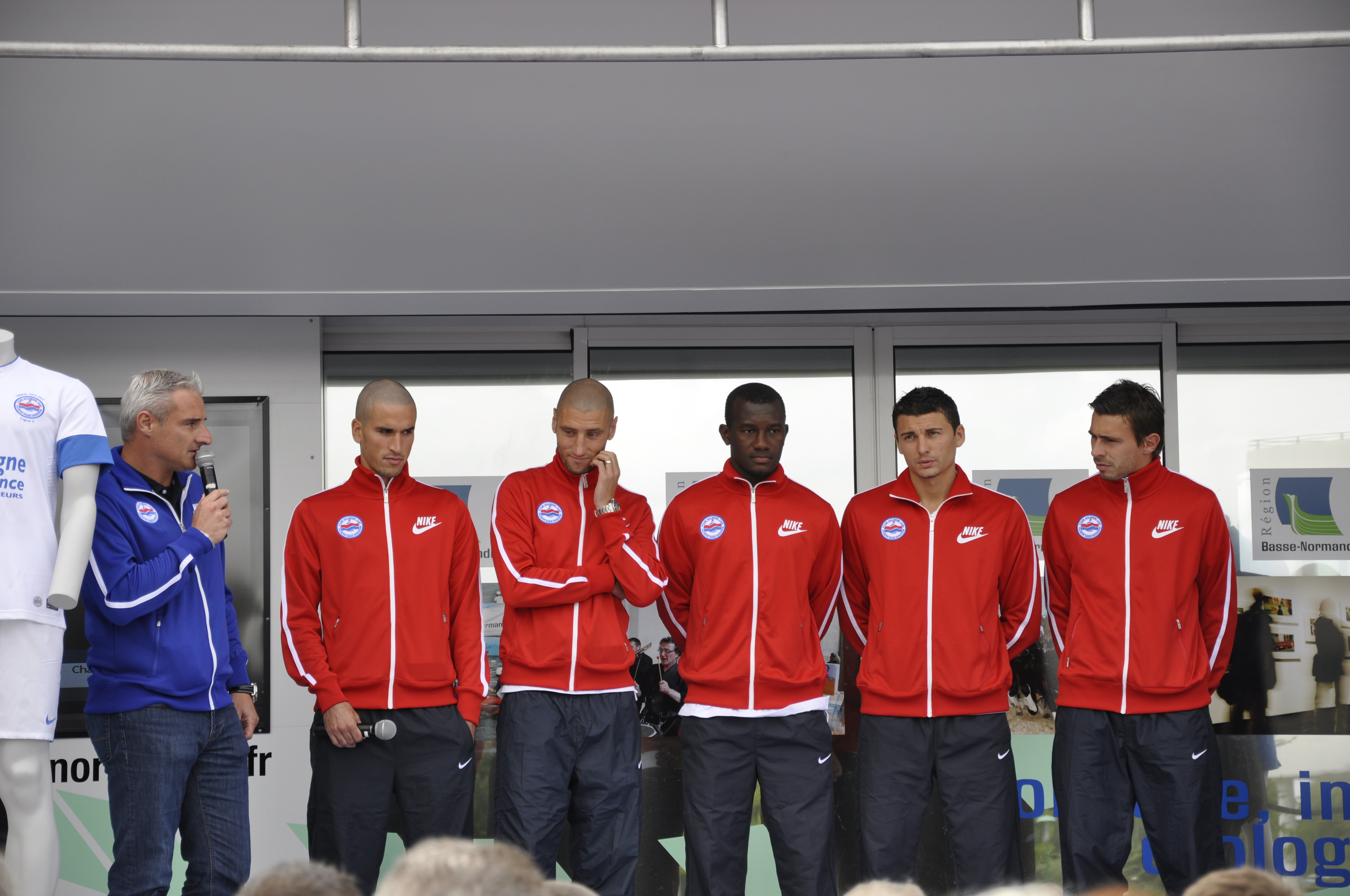 Présentation des nouvelles recrues du SM Caen pour la saison 2012-2013